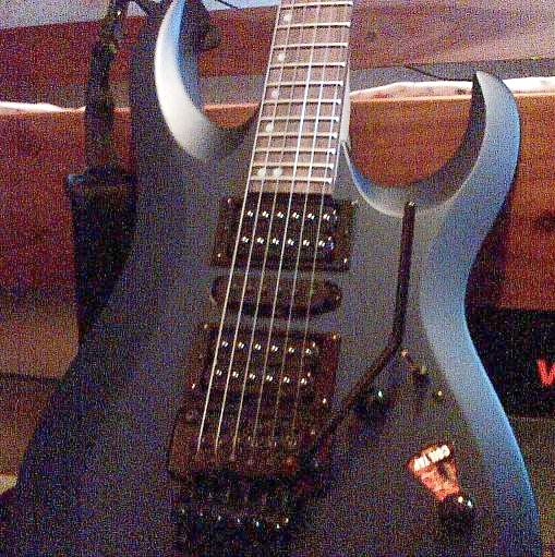 Cort X-6 guitar